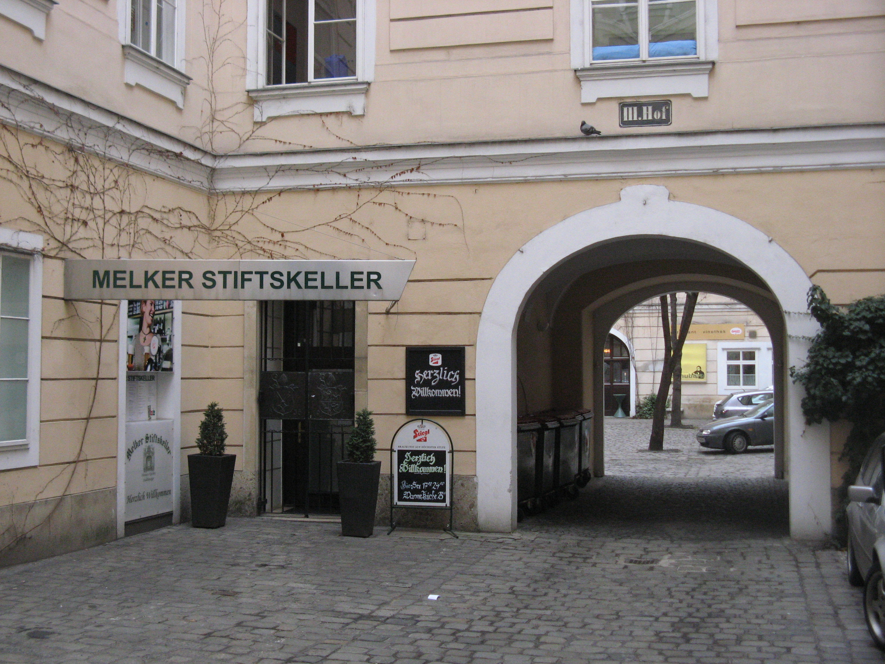 Melker Stiftskeller, Melker Hof, Schottengasse 3-3a, Wien-Innere Stadt